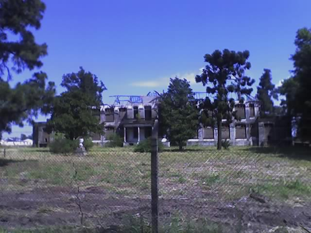 Ruinas del Sanatorio Social Domingo F. Sarmiento, sanatorio para tuberculosos en la localidad de Merlo, Provincia de Buenos Aires.